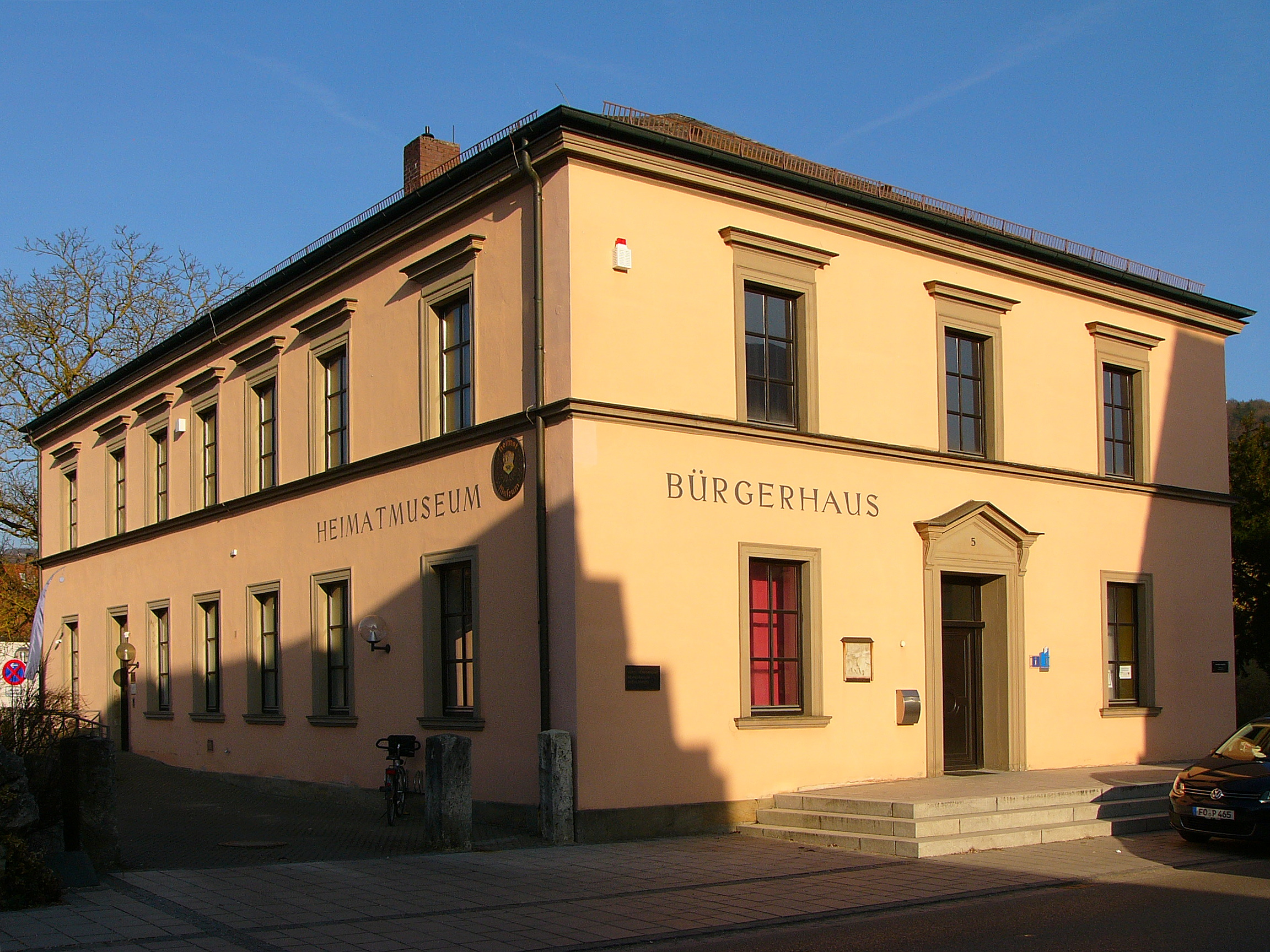 Ebermannstadt, Bahnhofstraße 5, Ehemaliges Amtsgericht; jetzt Bürgerhaus und Heimatmuseum, zweigeschossiger massiver Putzbau, flach geneigtes Walmdach, spätklassizistisch, 1870. This is a photograph of an architectural monument.